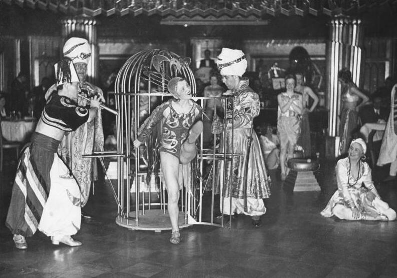 Varietévorführungen im Haus Vaterland